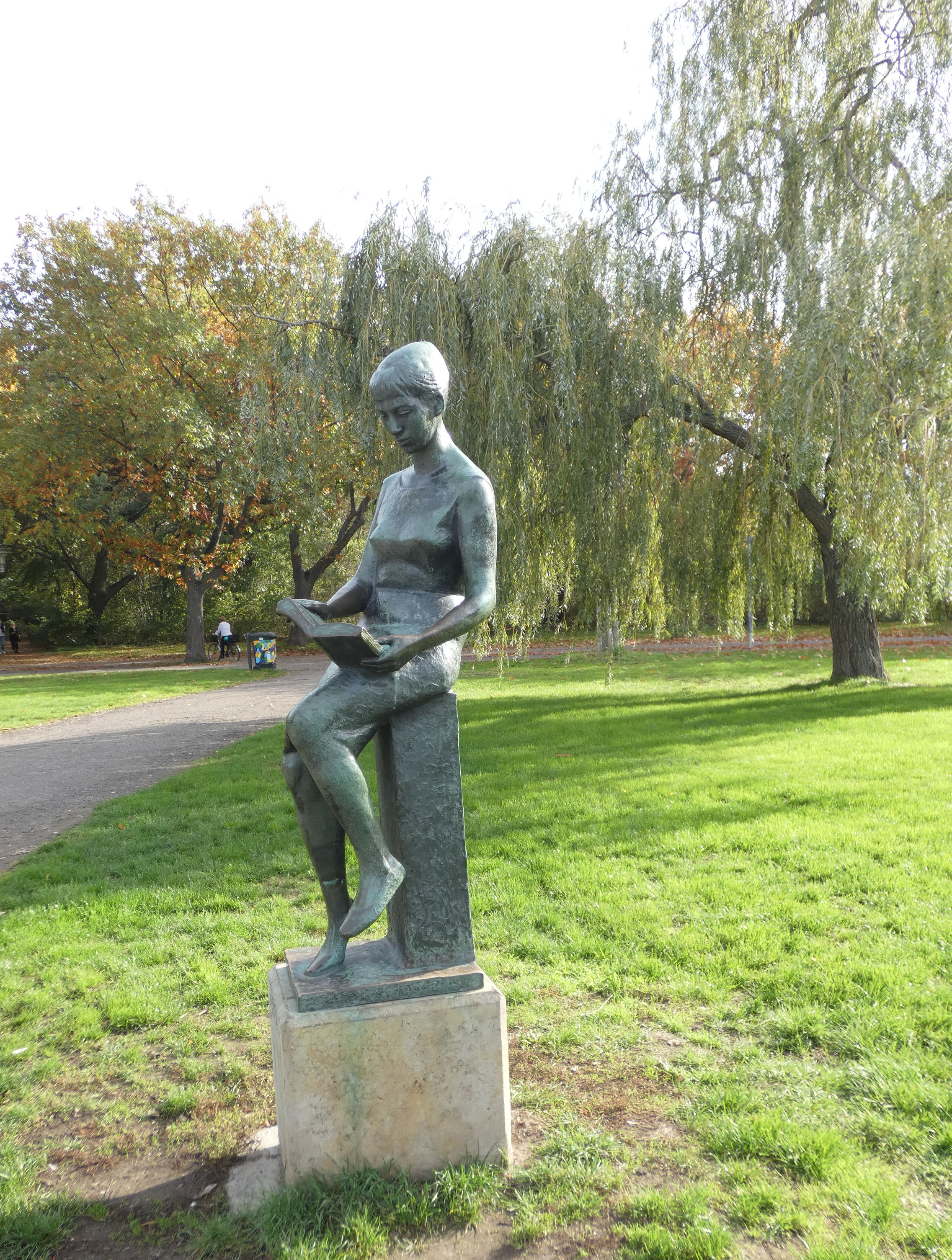 Skulptur "Die Lesende" von Heinz Beberniß auf der Ziegelwiese, Halle (Saale)